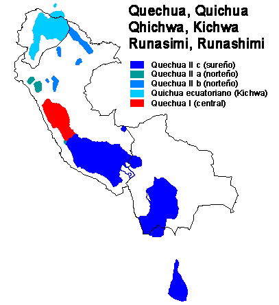 Quechua I, II a, b, c, Quichua ecuatoriano (map: Quechua varieties)